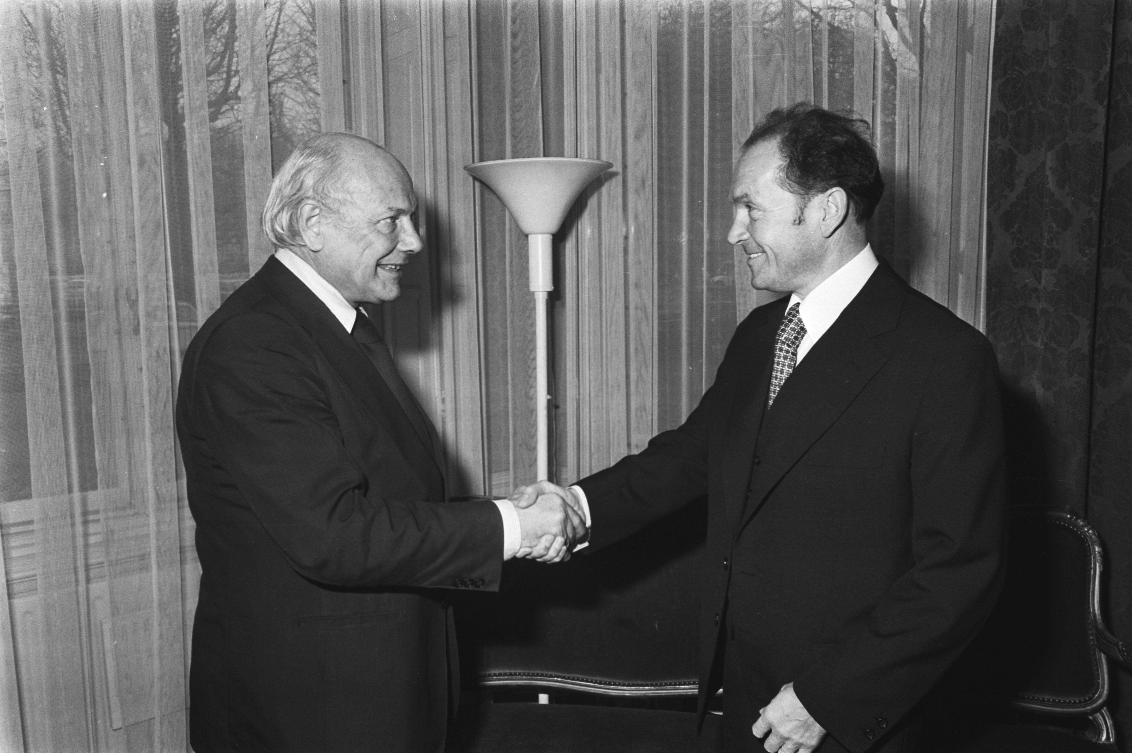 Collectie / Archief : Fotocollectie Anefo Reportage / Serie : [ onbekend ] Beschrijving : Premier Den Uyl ontvangt minister Buitenlandse Zaken van DDR, Oskar Fischer ; begroeting Datum : 24 januari 1977 Locatie : D.D.R., Duitsland Trefwoorden : begroetingen, ontvangsten Persoonsnaam : Uyl, Joop den Fotograaf : Peters, Hans / Anefo Auteursrechthebbende : Nationaal Archief Materiaalsoort : Negatief (zwart/wit) Nummer archiefinventaris : bekijk toegang 2.24.01.05 Bestanddeelnummer : 928-9933